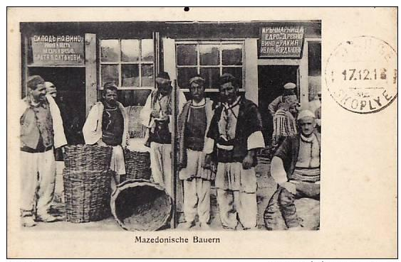 Селяни пред кръчма в Скопие през Първата световна война.